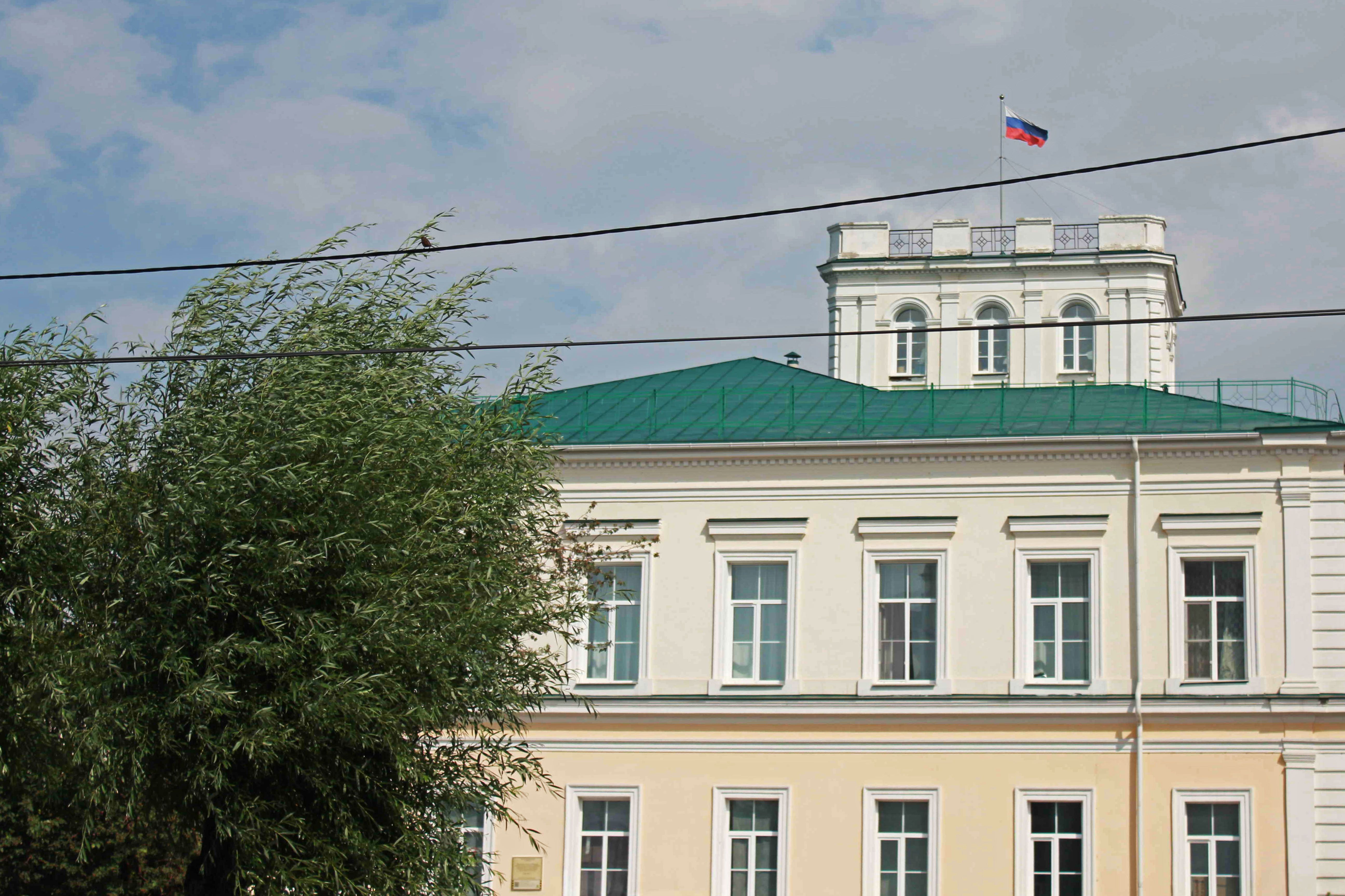 Дом генерал-губернатора (Омская область, Омск, улица Ленина, 23)